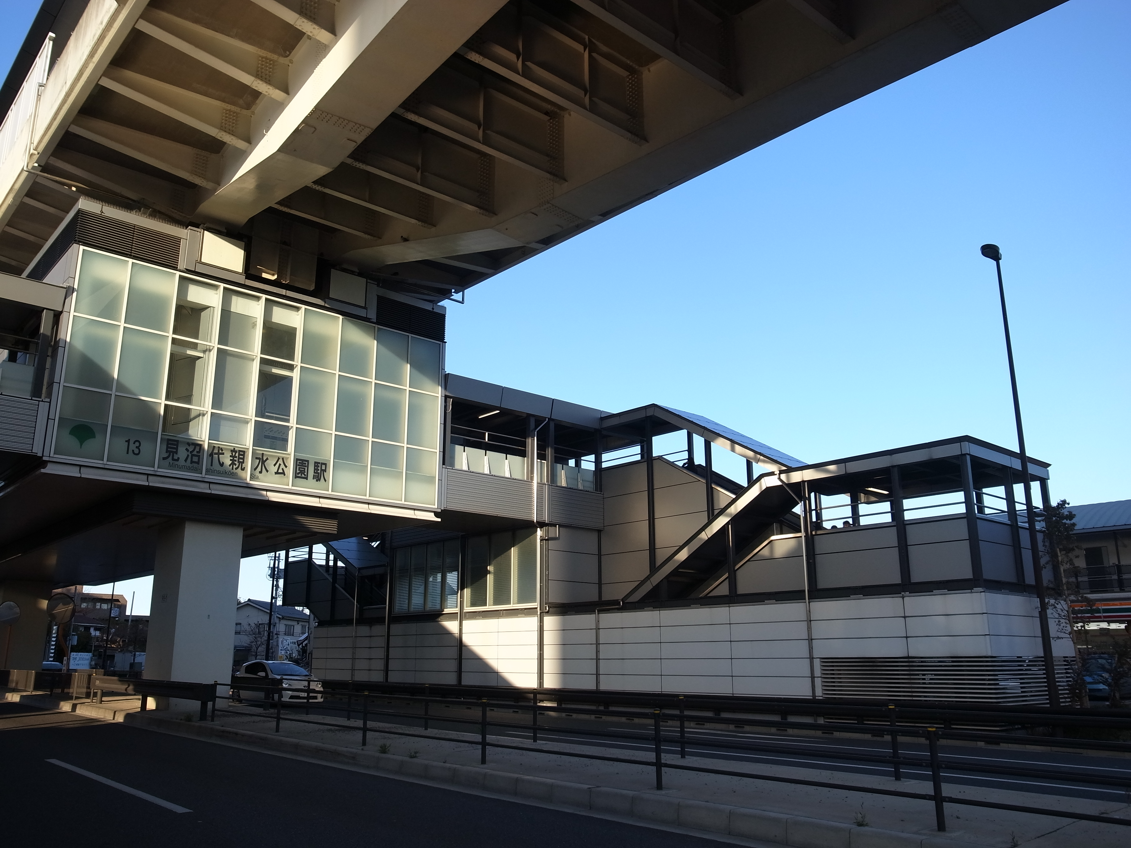 Minumadai-shinsuikōen Station (見沼代親水公園駅)